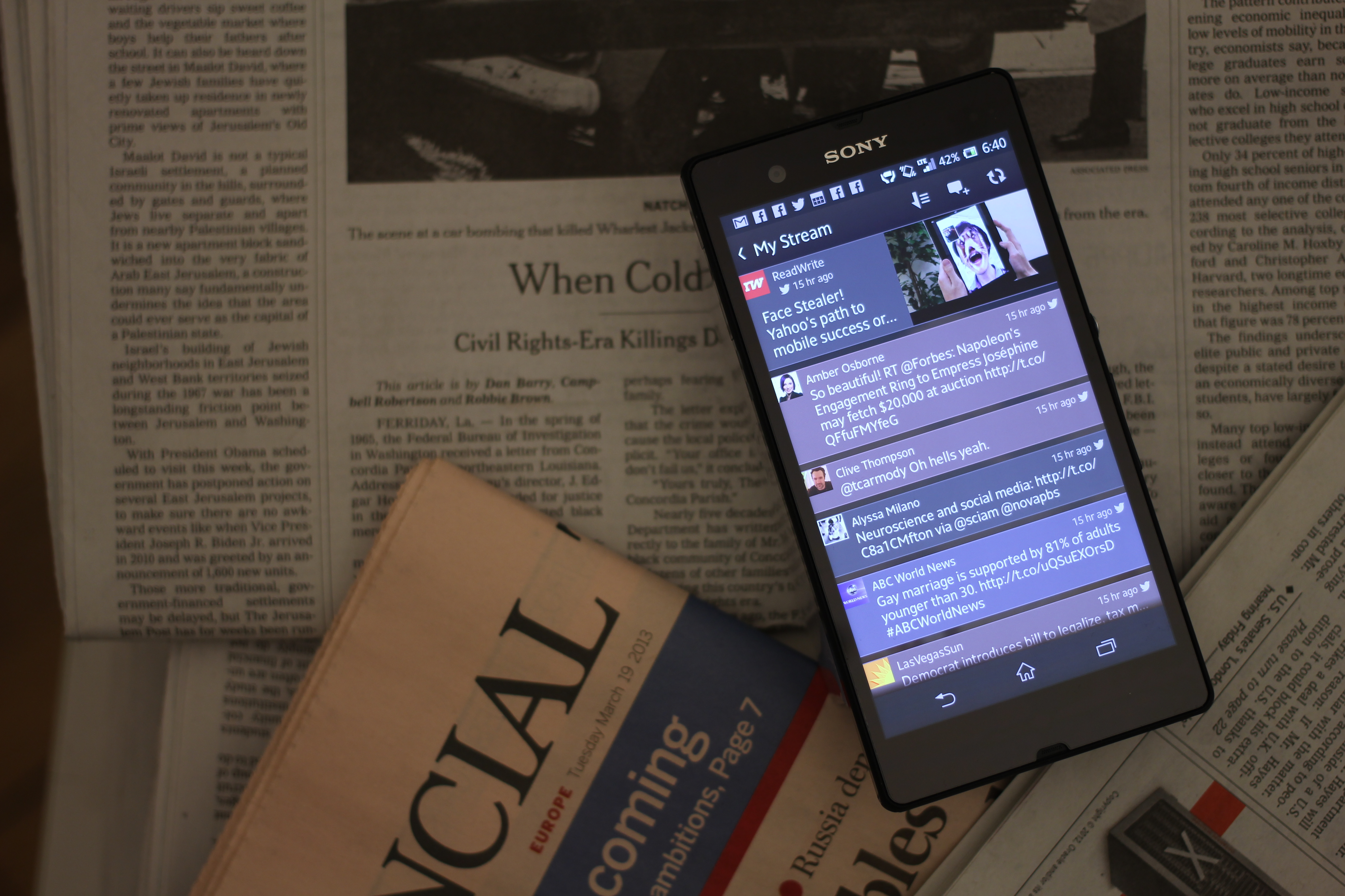 Sony Xperia Z